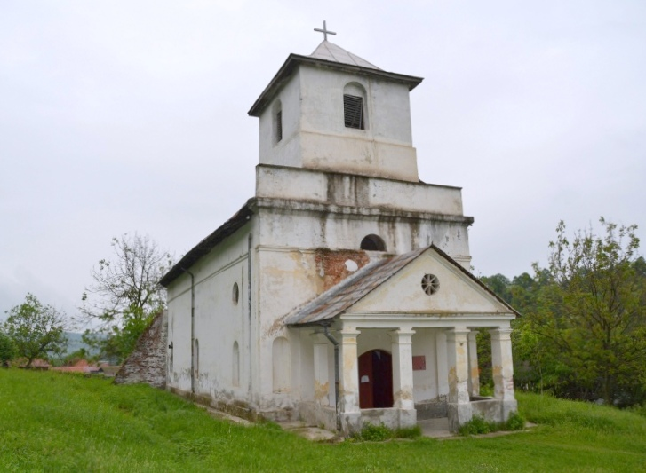 Biserica „Sfântul Nicolae”, sat Cernaia; comuna Corcova în centrul satului 1808-1835, pictură 1843